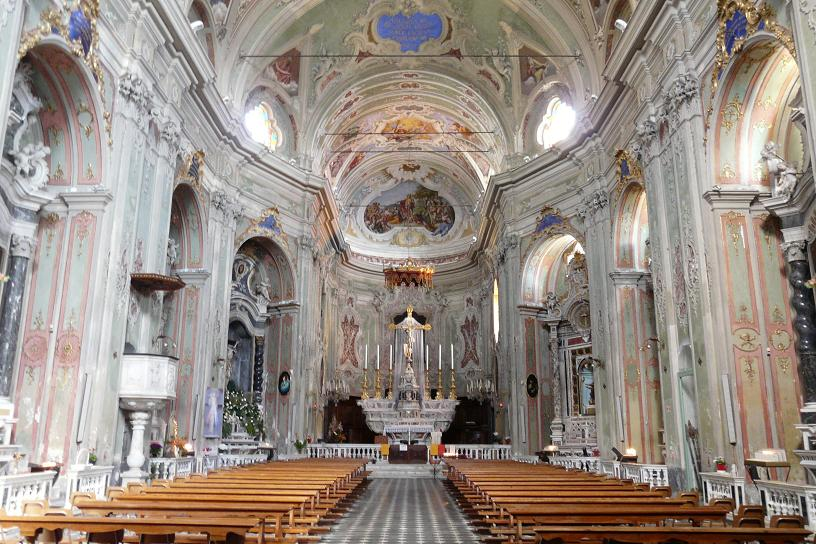 Chiesa parrocchiale di San Giovanni Battista, Cervo (IM), Liguria, Italia